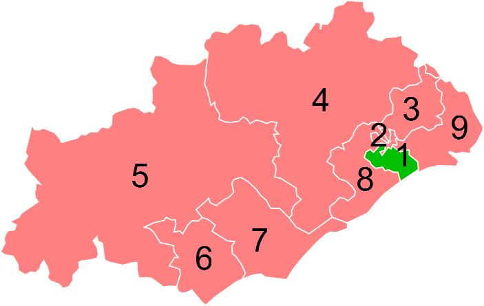 Résultats des élections législatives de l'Hérault en 2012